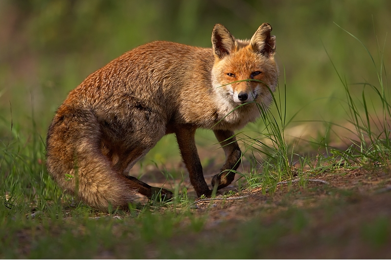 Vulpes vulpes